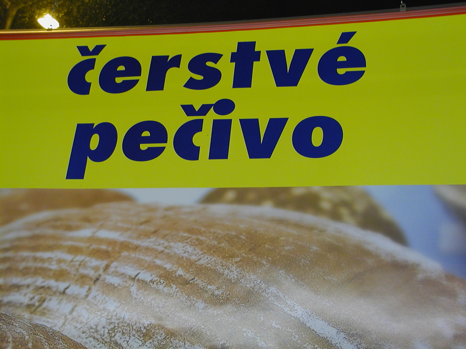 Przykład kruczka polsko-słowackiego